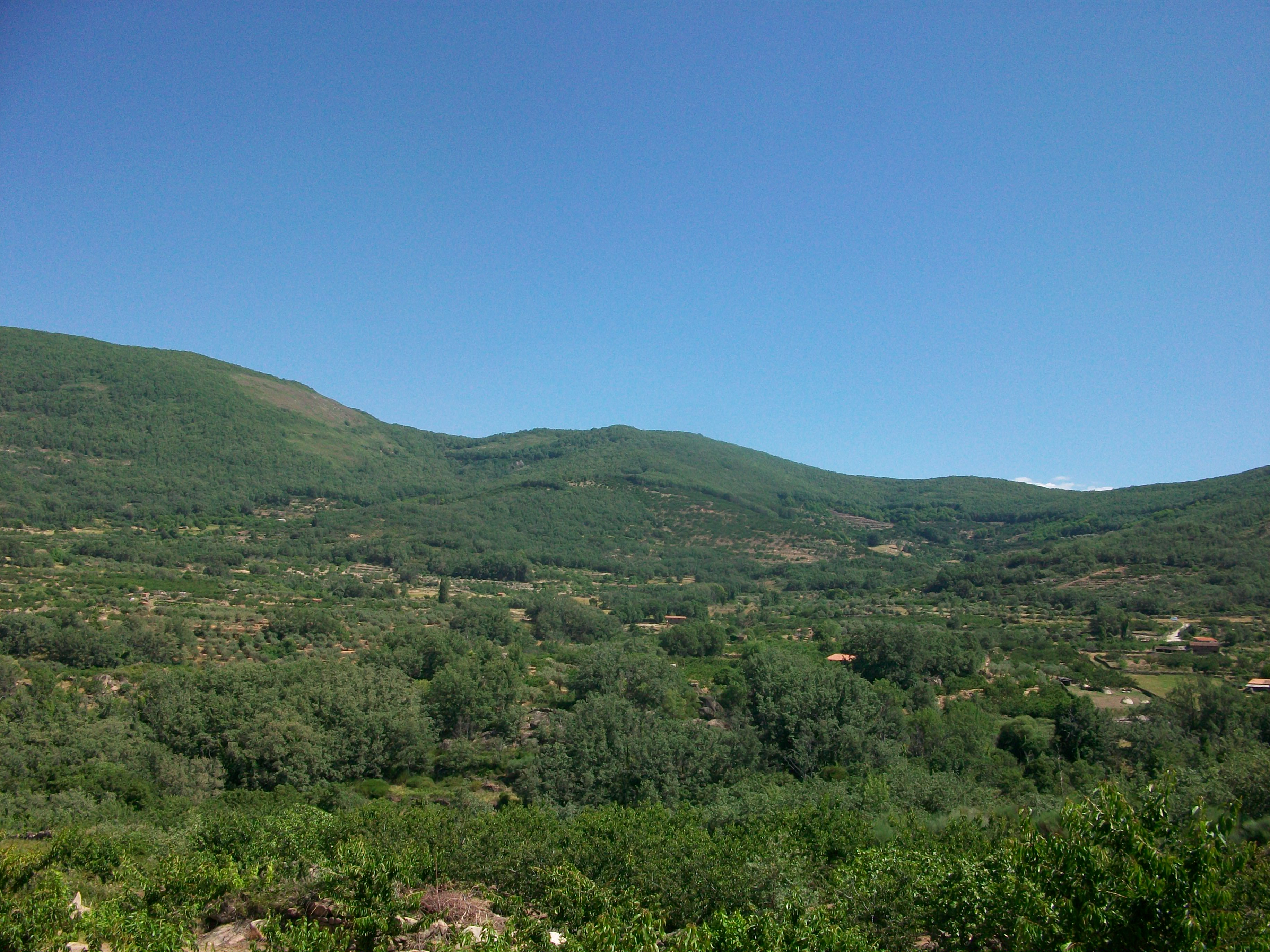 Vista parcial de la Sierra de San Bernabé desde el camino de la Dehesa Vieja.